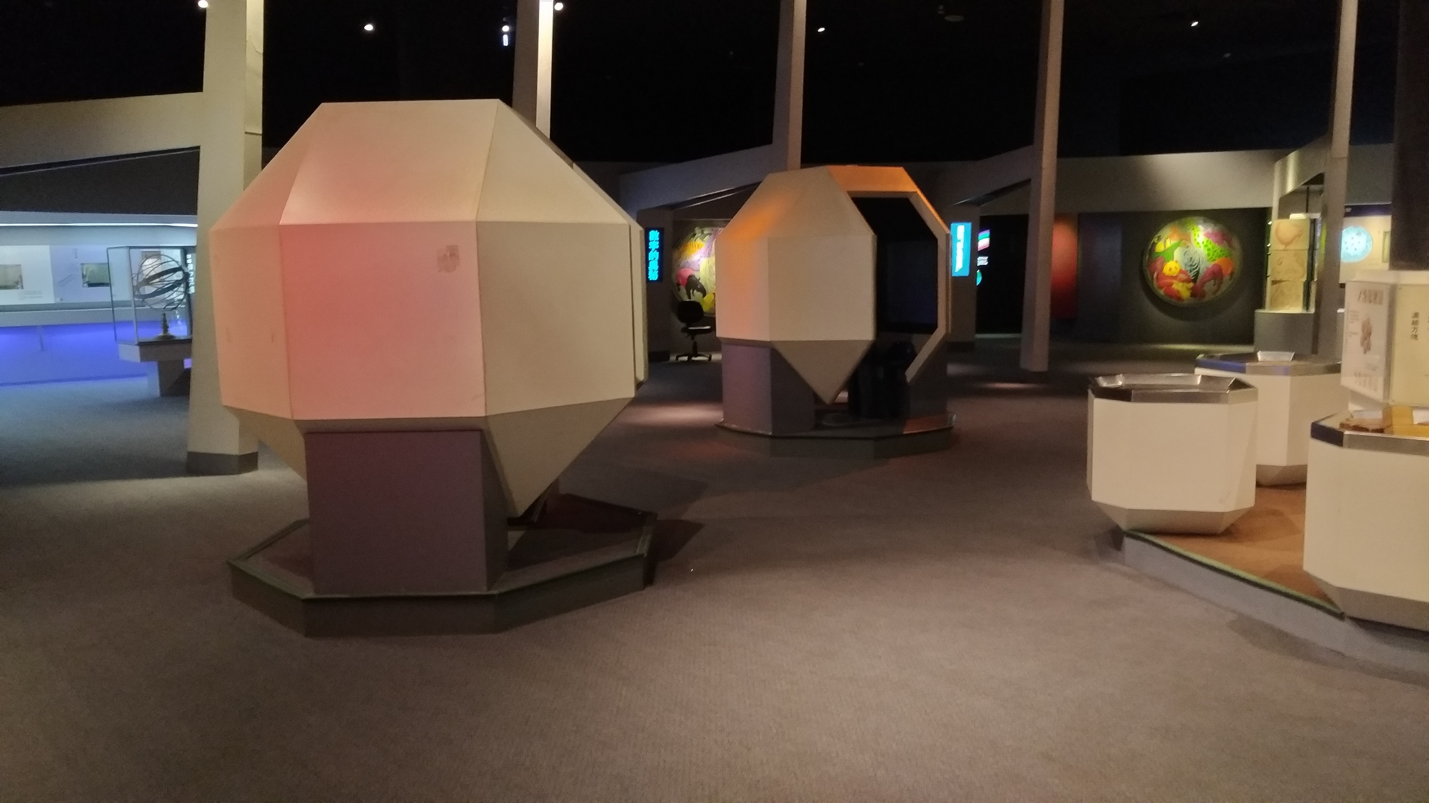 中文（台灣）: 數與形，位於國立自然科學博物館地下一樓的展館